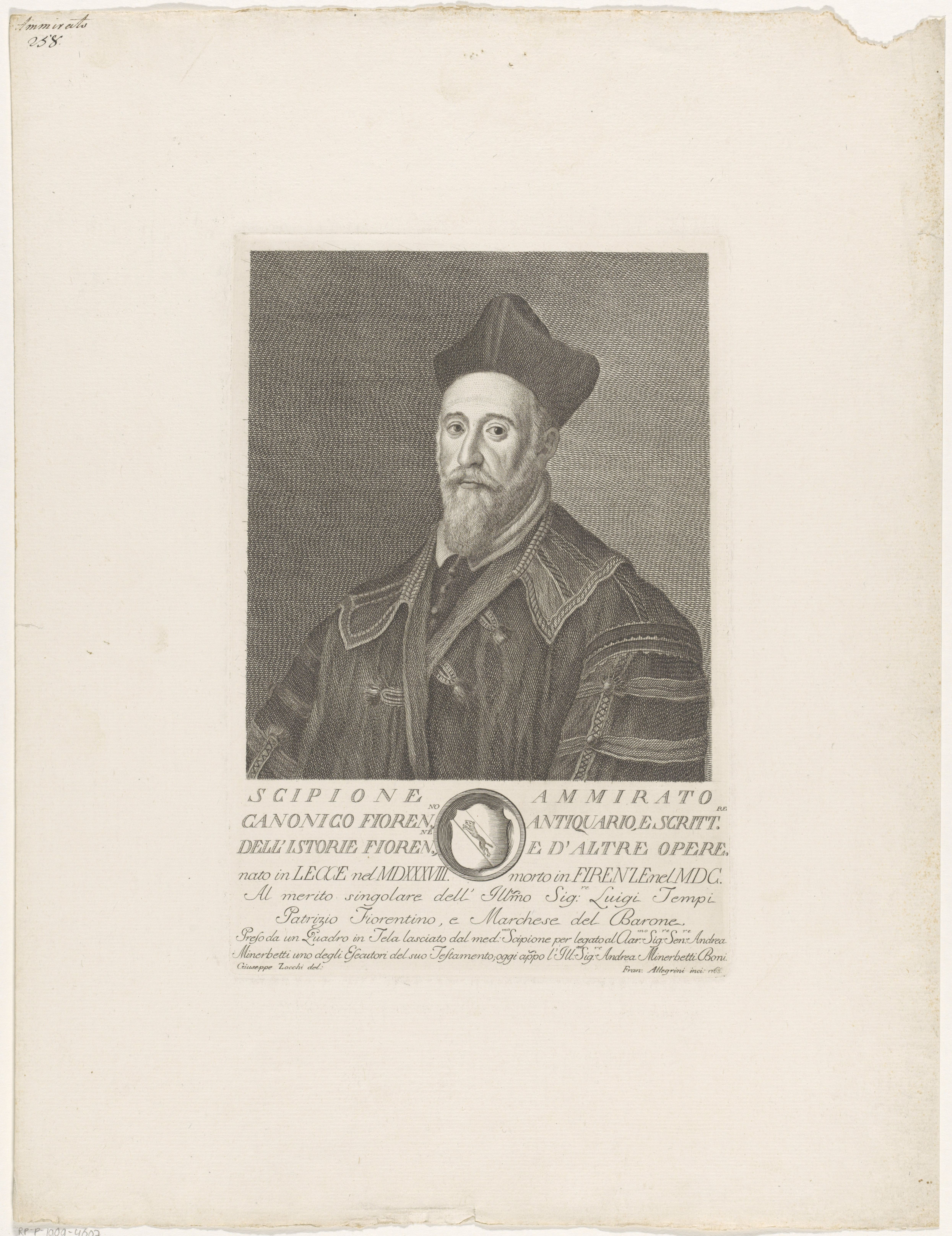 IdentificatieTitel(s): Portret van Scipione AmmiratoPortretten van beroemde Italianen met wapenschild in ondermarge (serietitel)Objecttype: prent Objectnummer: RP-P-1909-4607Opschriften / Merken: verzamelaarsmerk, verso, gestempeld: Lugt 2228opschrift, recto, handgeschreven in bruine inkt: ‘Ammirato / 258’Omschrijving: Portret van historicus Scipione Ammirato. Onder het portret een tekst in het Italiaans en een wapenschild in een cirkelvormig kader.VervaardigingVervaardiger: prentmaker: Francesco Allegrini (vermeld op object)naar tekening van: Giuseppe Zocchi (vermeld op object)opgedragen aan: Luigi Tempi (vermeld op object)Plaats vervaardiging: ItaliëDatering: 1763Fysieke kenmerken: gravureMateriaal: papier Techniek: graveren (drukprocedé)Afmetingen: blad: h 296 mm × b 200 mmToelichtingDeze prent maakt deel uit van een reeks portretprenten van onbekende omvang. De prenten zijn gemaakt door meedere prentmakers, onder Wie: Francesco Allegrini en Carlo en Raimondo Faucci.OnderwerpWat: historical personsWieScipione AmmiratoVerwerving en rechtenVerwerving: aankoop 1905Copyright: Publiek domein